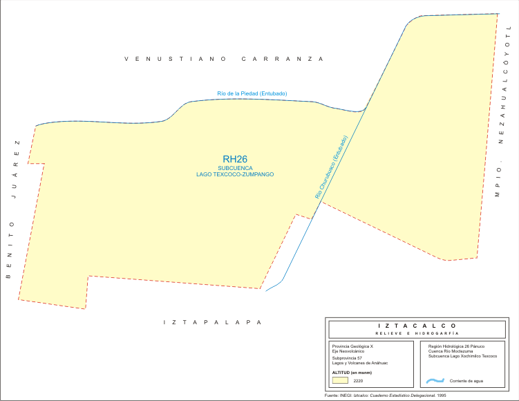 Mapa de la delegación Iztacalco, DF. Datos sobre relieve e hidrografía